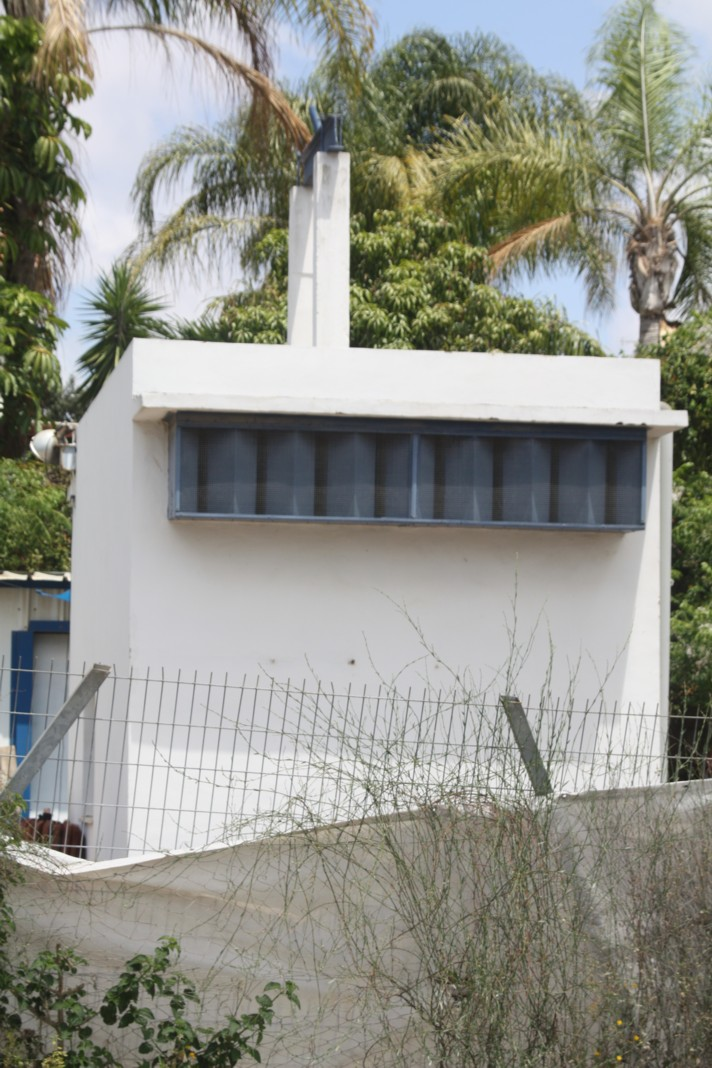 Deserted well in Hashomer St., Ramat Hasharon באר נטושה ברח' השומר, רמת השרון